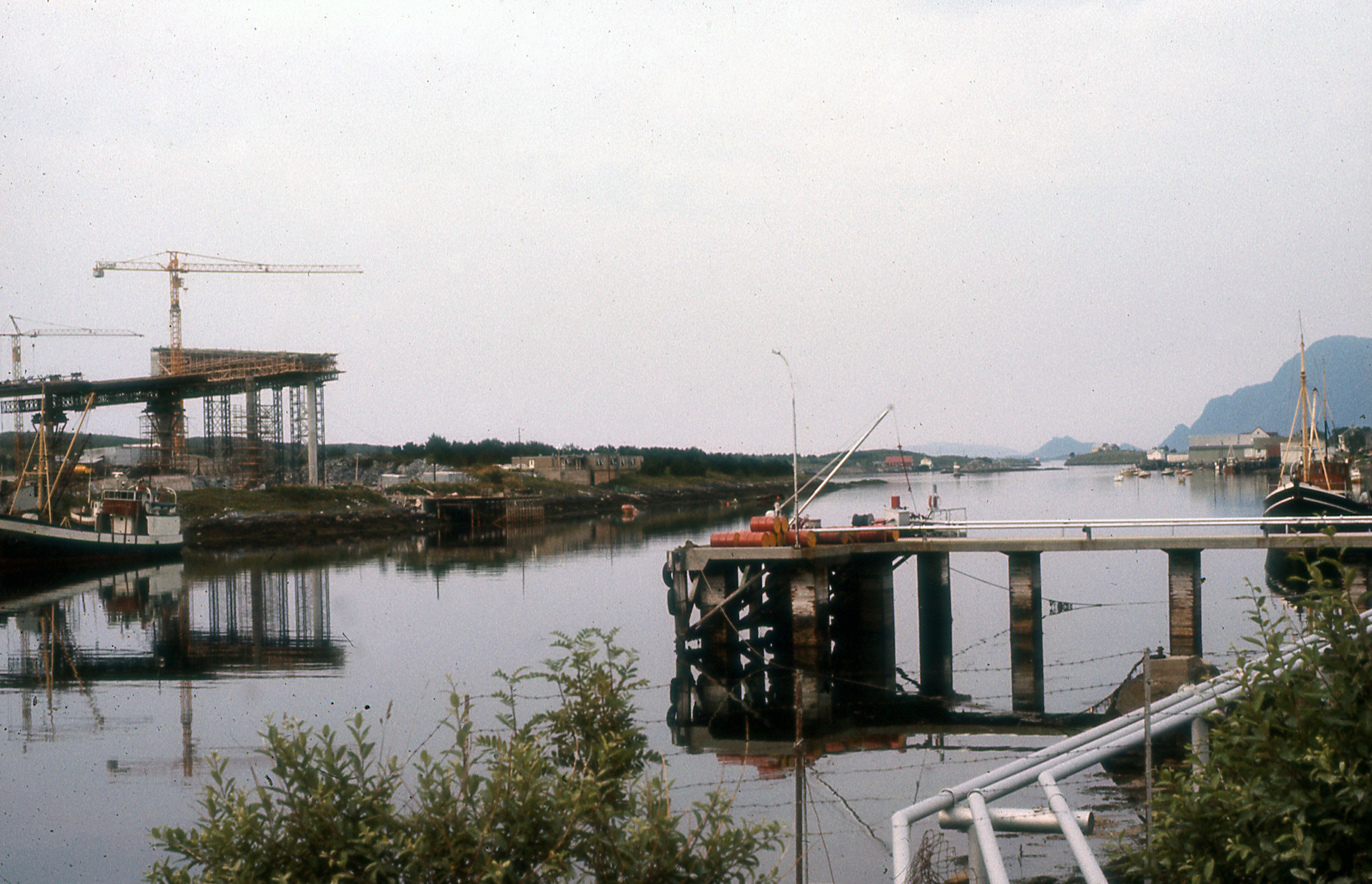 Brønnøysundbrua under oppføring i 1978. Eksakt dato når bilde er tatt er ukjent.